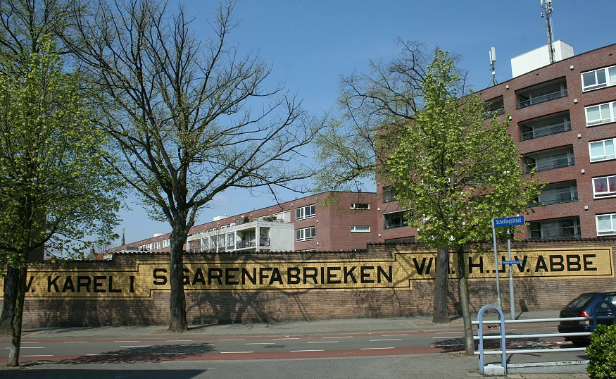 Tongelresestraat in Eindhoven (de buurt "Irisbuurt" in Stratum)